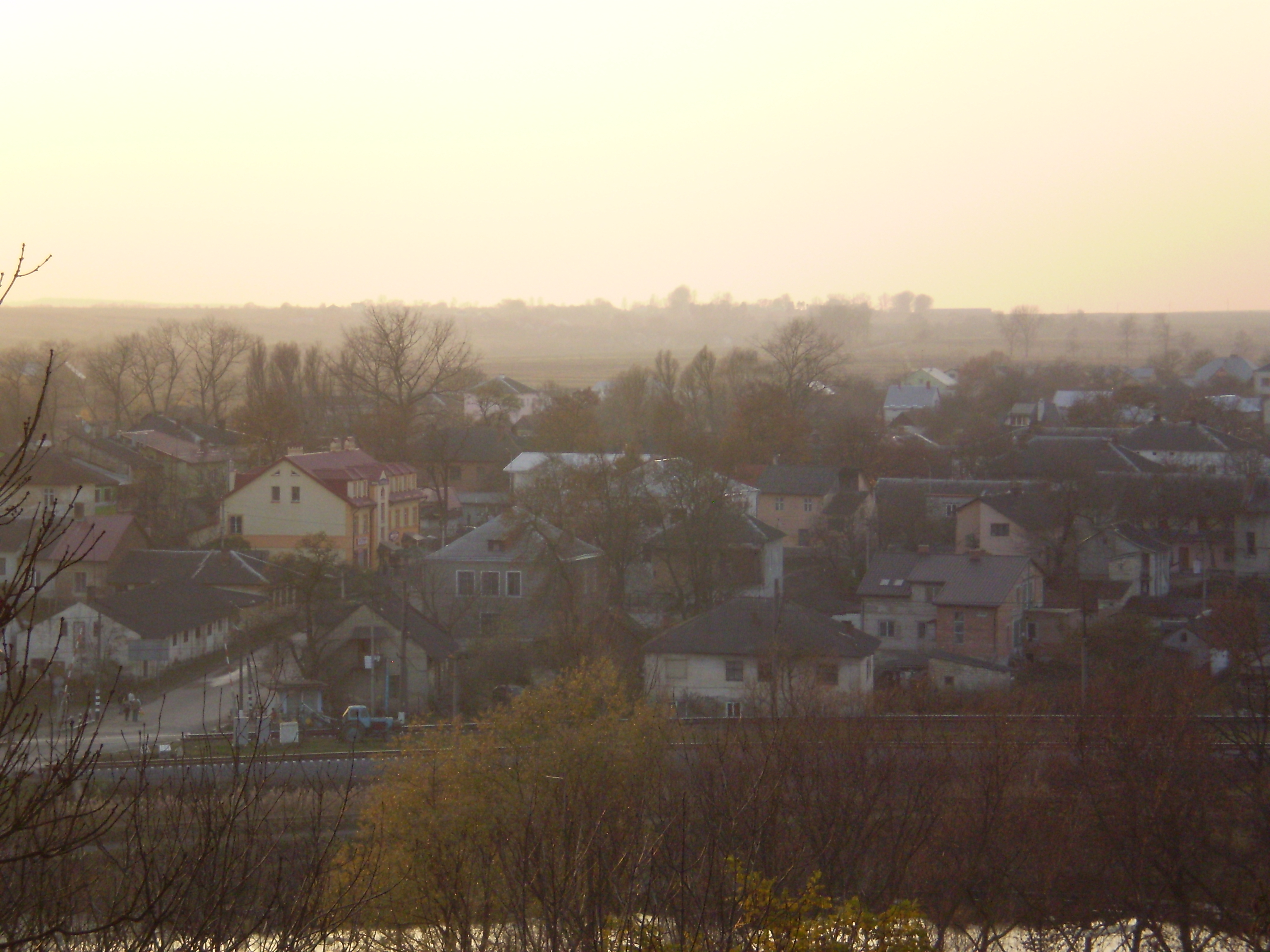 Вид на містечко Щирець з Золотої Гори восени